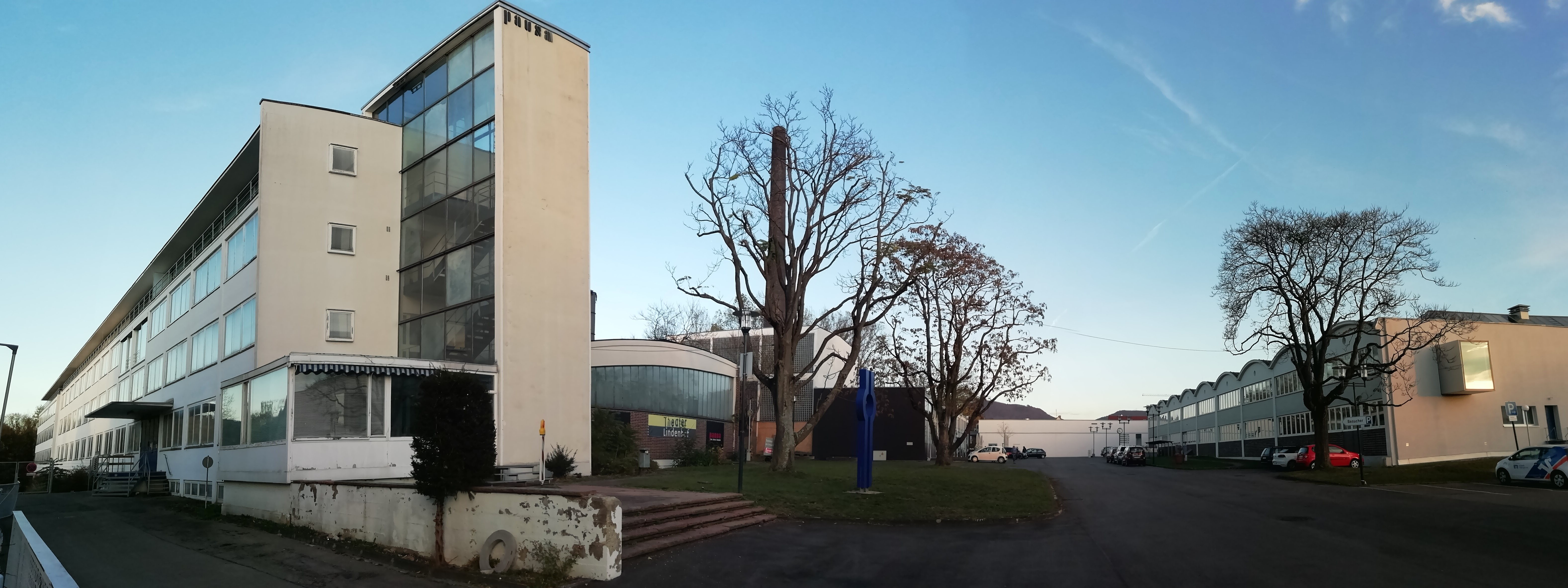 Von Westen